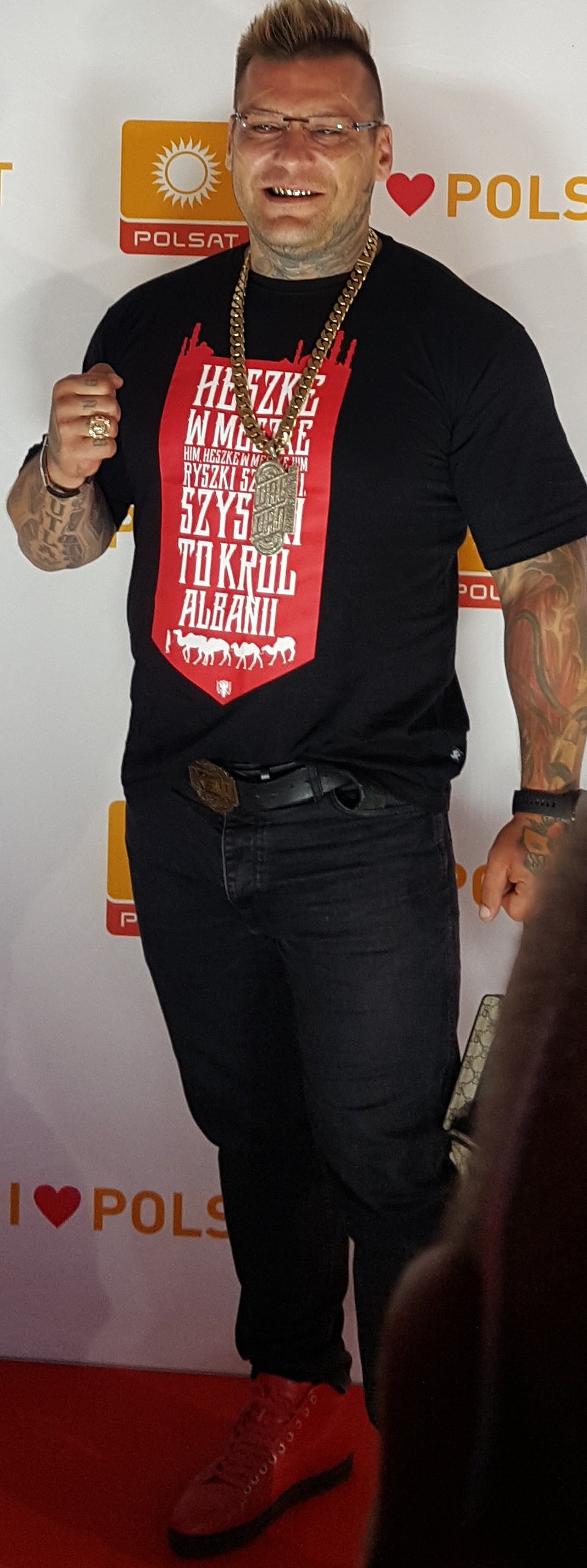 Polski zawodnik mieszanych sztuk walki i raper Paweł "Popek" Mikołajuw na jesiennej konferencji ramówkowej telewizji Polsat w Warszawie, 28 sierpnia 2018.